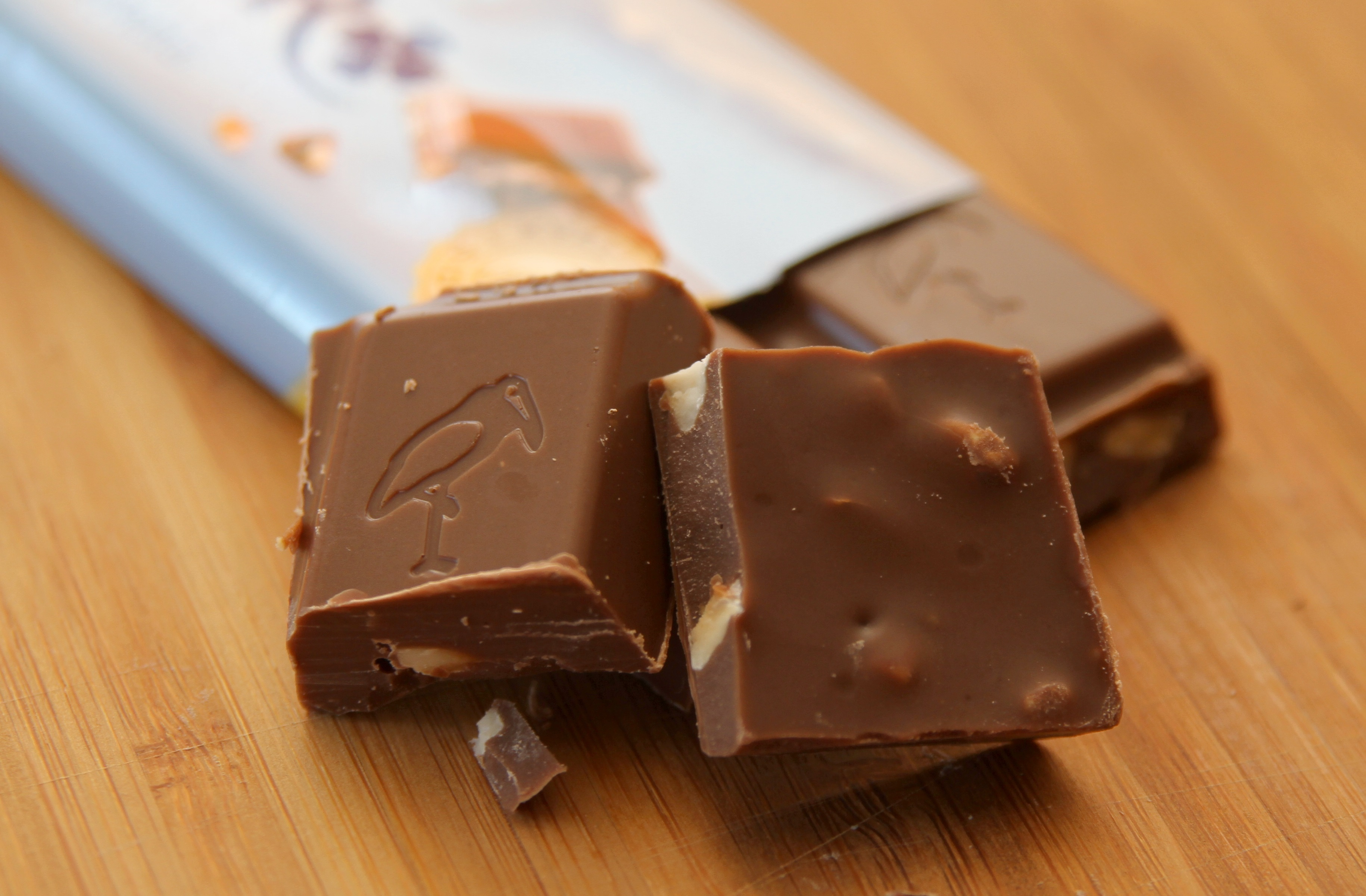 Firkløver.